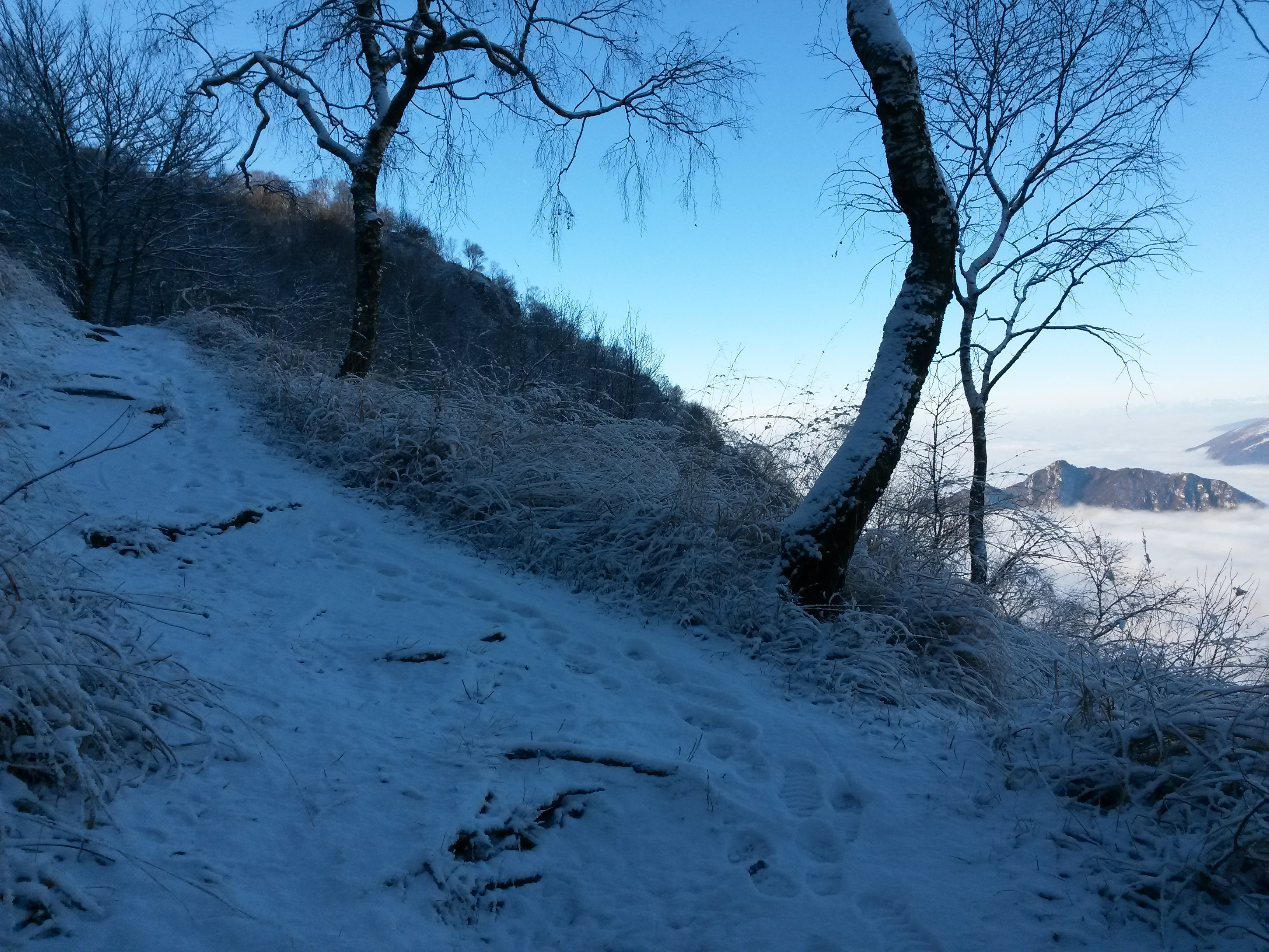 sentiero per il Mt.Magnodeno innevato